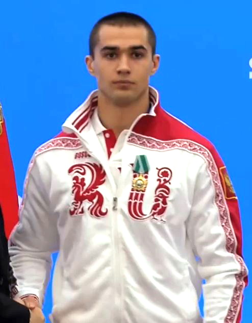 Орденом Дружбы награждён олимпийский чемпион в бобслее Алексей Негодайло.